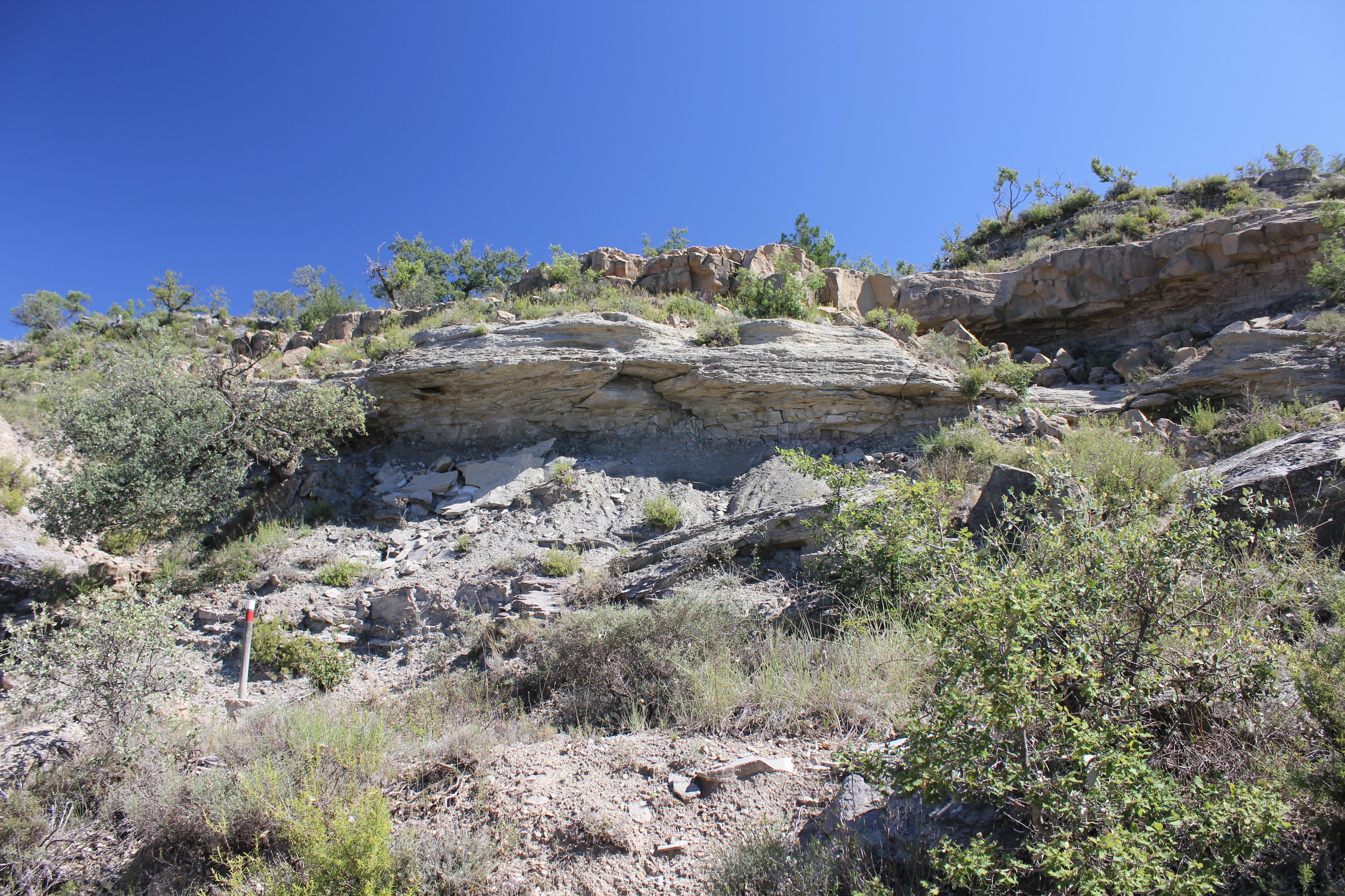 Aragonés: Formacions erosivas en a penya arenisca, en a valle d'o Susía.